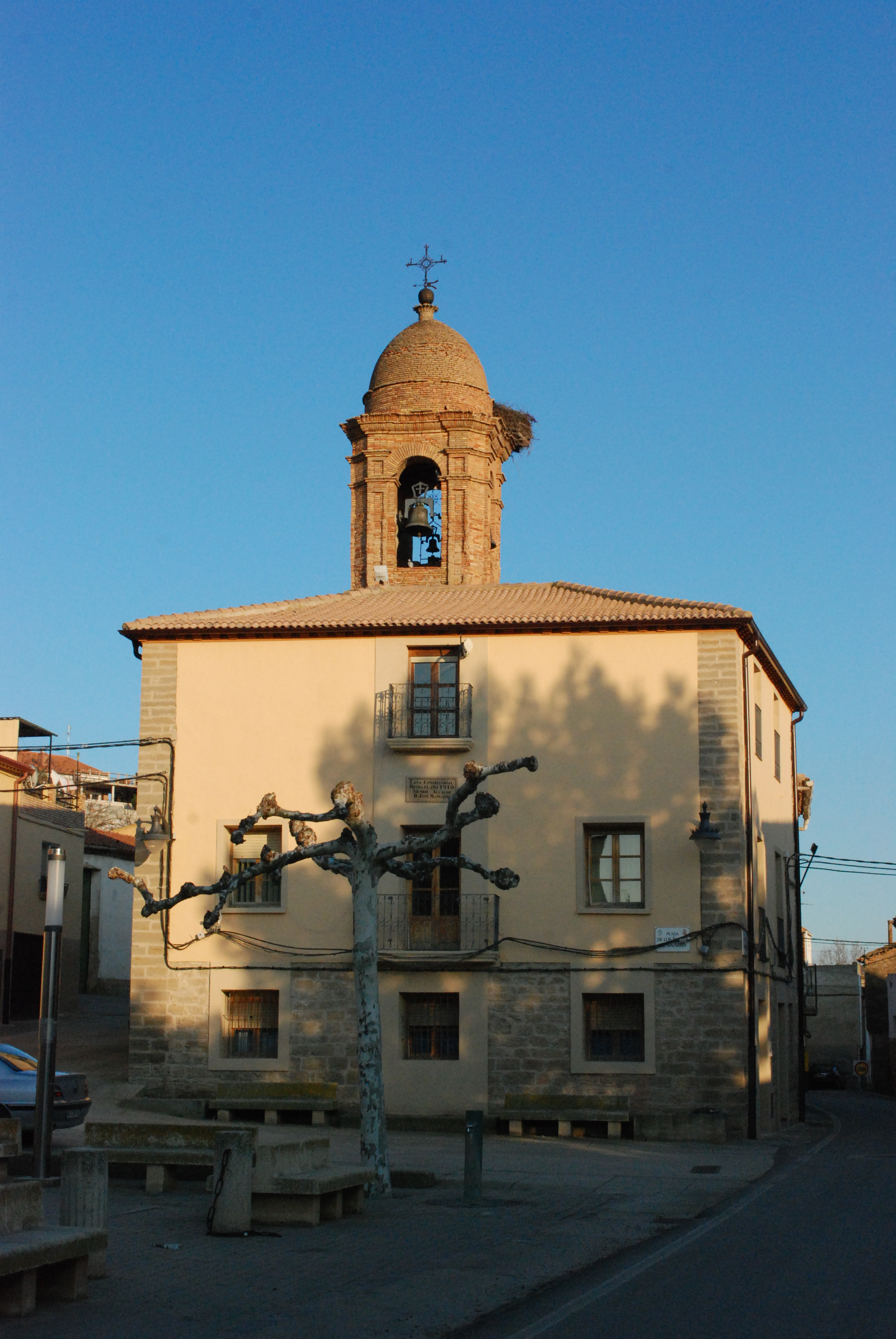 Fachada del Ayuntamiento y torre de la iglesia